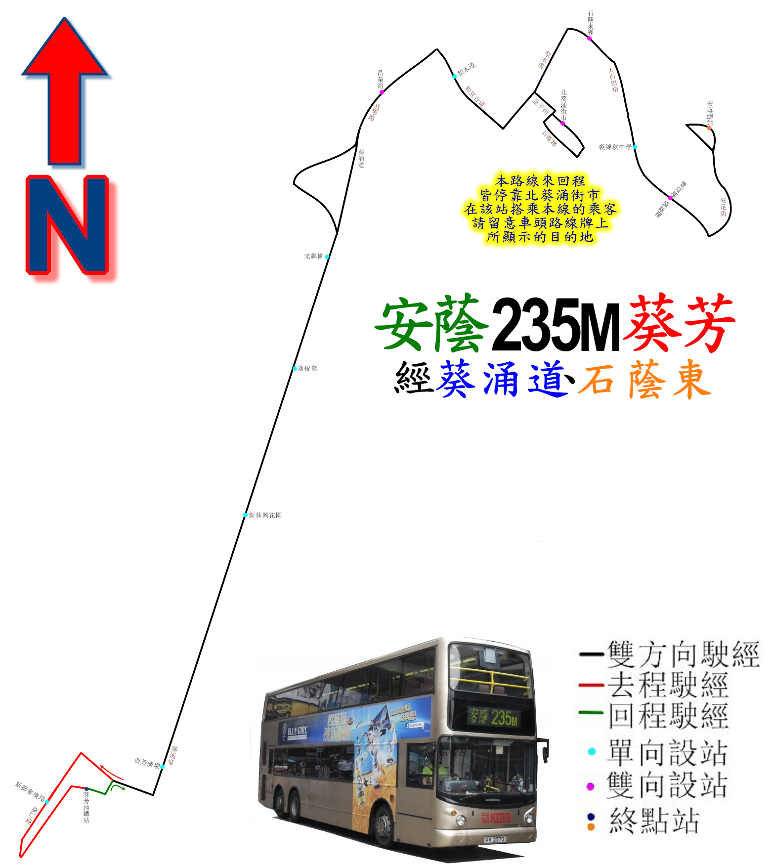 中文（香港）: 九巴235M線的走線圖